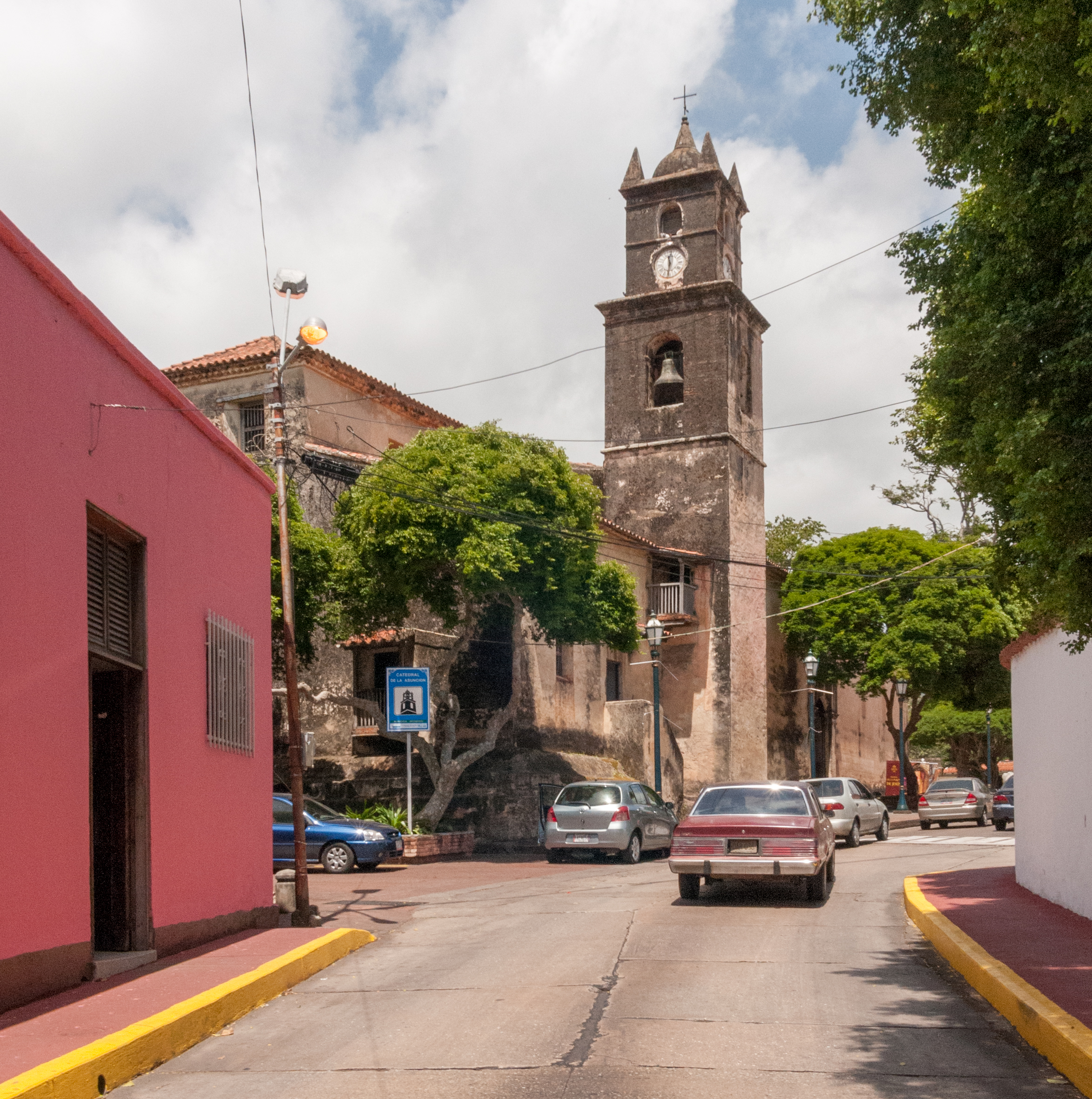 Catedral de La Asunción, Isla de Margarita